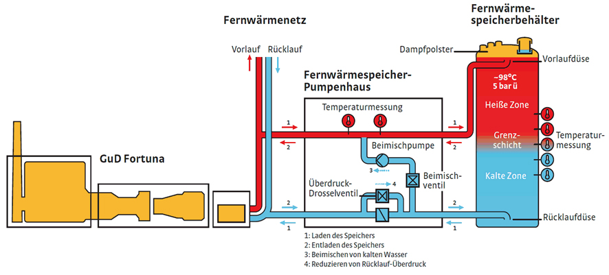 Funktionsdiagramm des Fernwärmespeichers; Block Fortuna des Kraftwerks Lausward